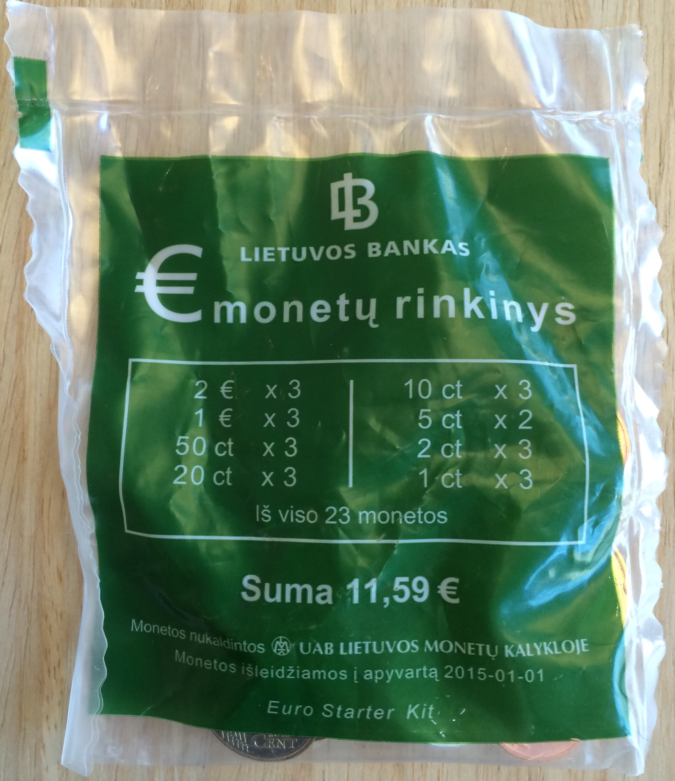 Lithuanian euro starter kit